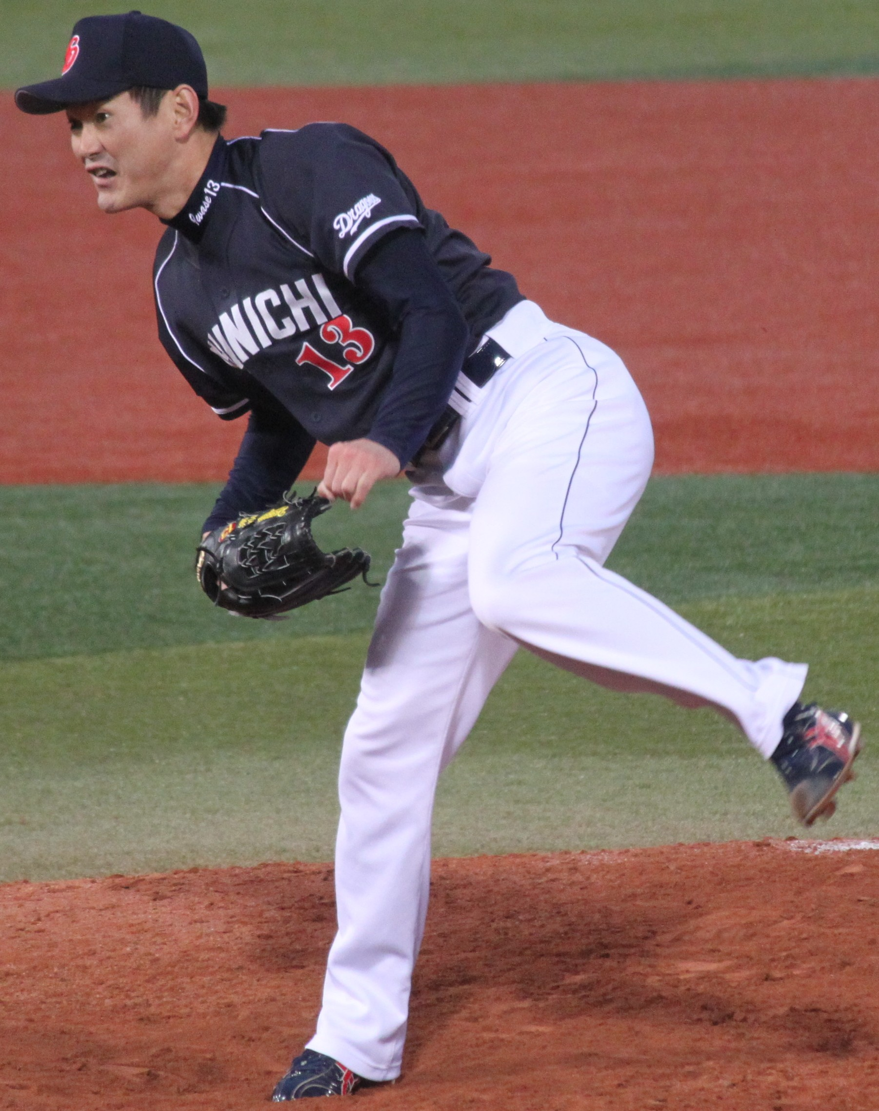 中日ドラゴンズ投手の岩瀬仁紀。横浜スタジアムにて。